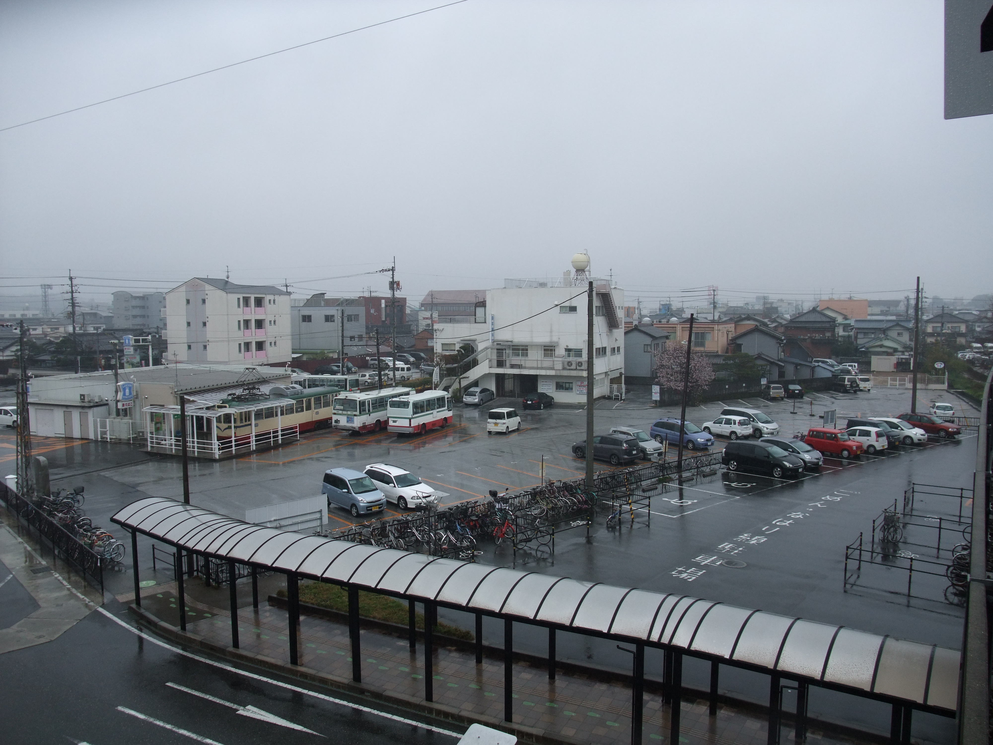 くろ鉄後免町駅からの眺め・西向き